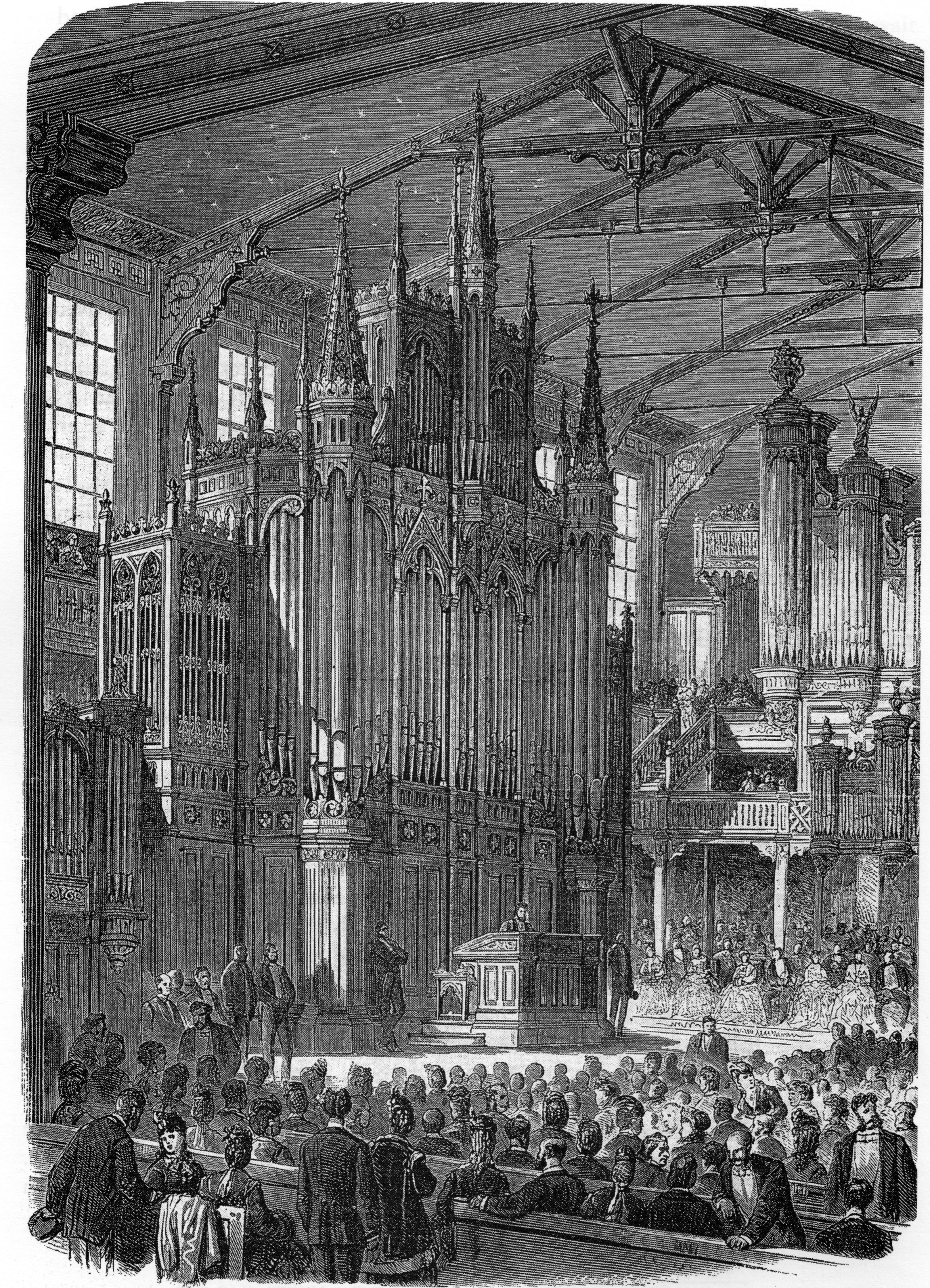 Second orgue de John Hopwood dans l'atelier d'Aristide Cavaillé-Coll, avenue de Maine (gravure publié dans L'Illustration [XXVIII], n° 1411, 12 mars 1870, p. 195